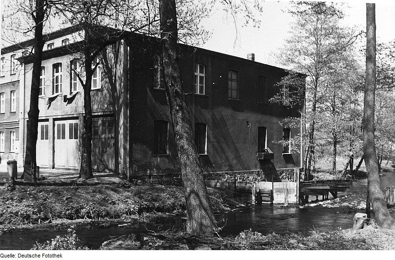 Original image description from the Deutsche Fotothek Spreetal-Zerre. Ehem. Mühle an der Spree